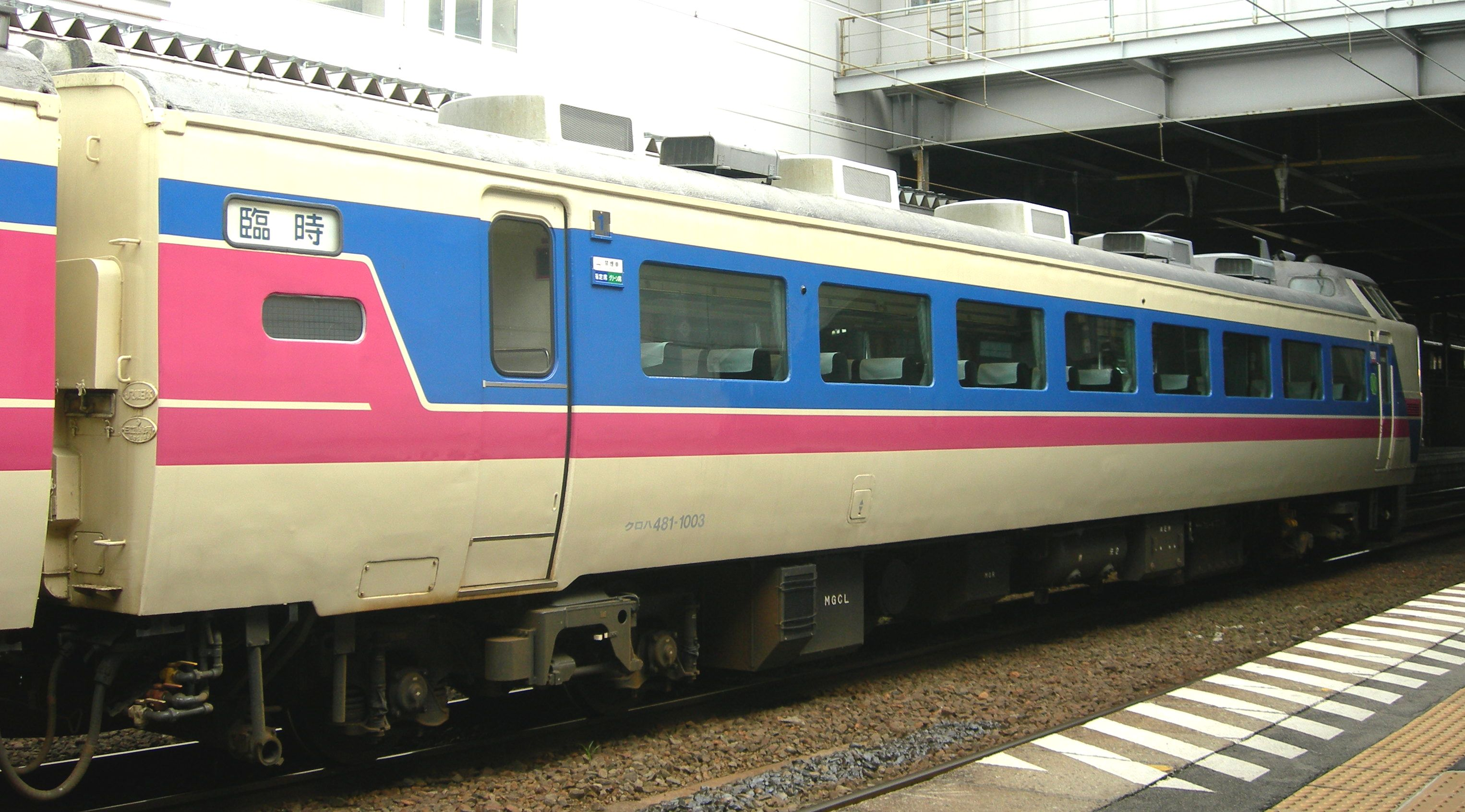 JR東日本 485系